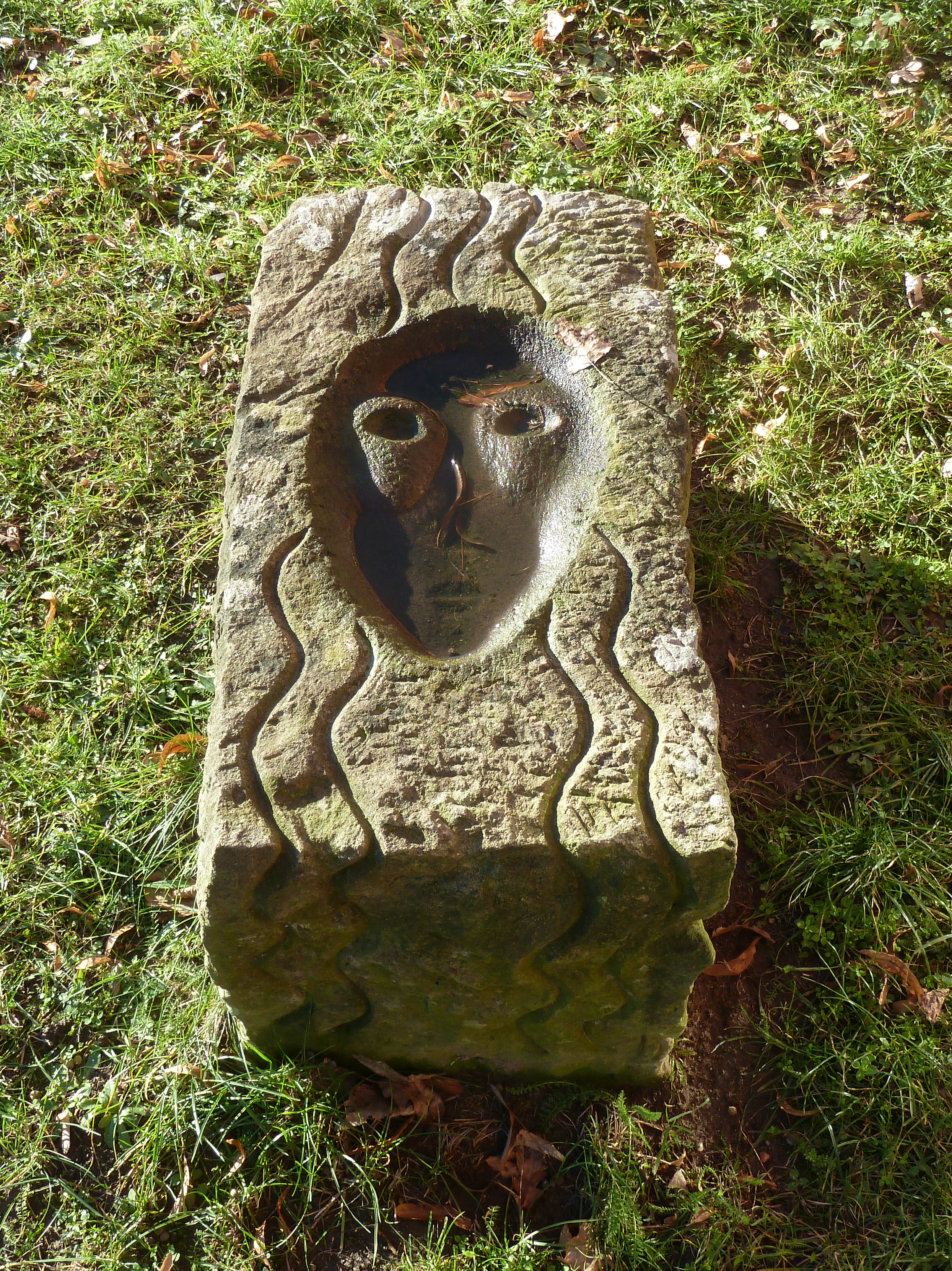 Christa Donner - Mnemosyne - Musensteine 9 an der Bundesbankfiliale in Dresden, St. Petersburger Straße 2 zur künstlerischen Markierung des Kaitzbachverlaufs